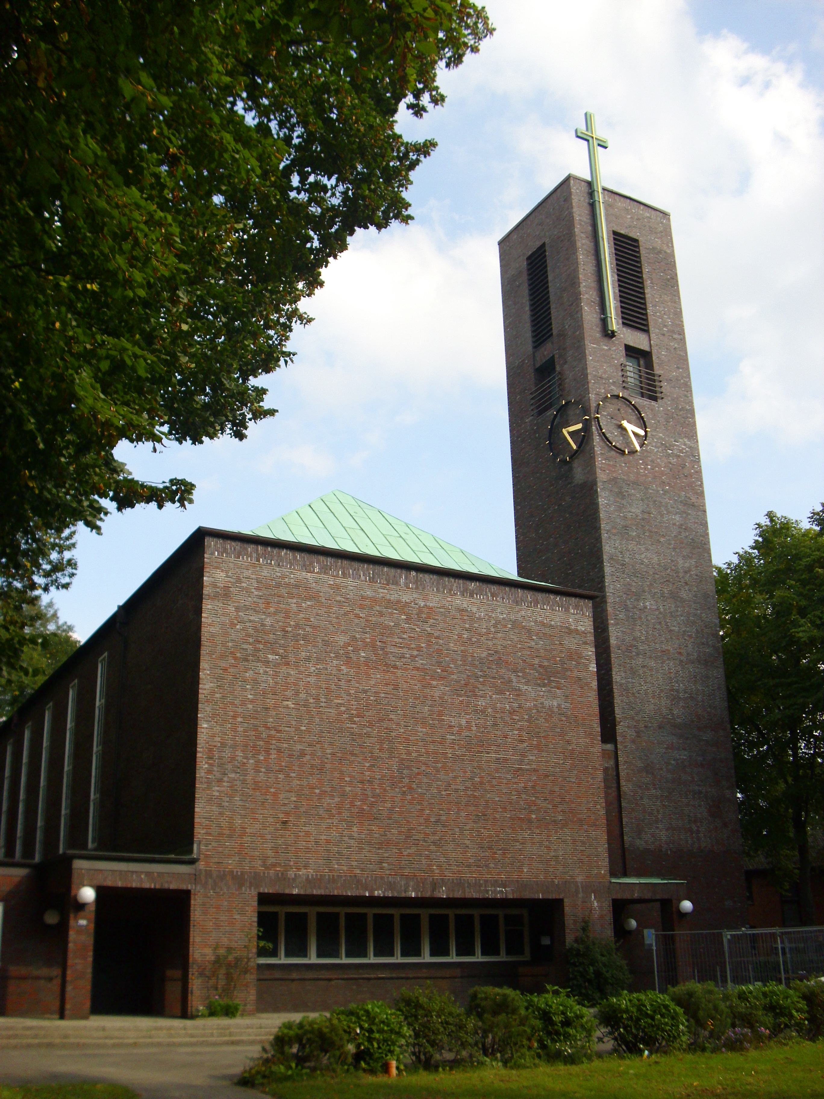 Ansgar-Kirche in Hamburg-Langenhorn, Langenhorner Chaussee 266